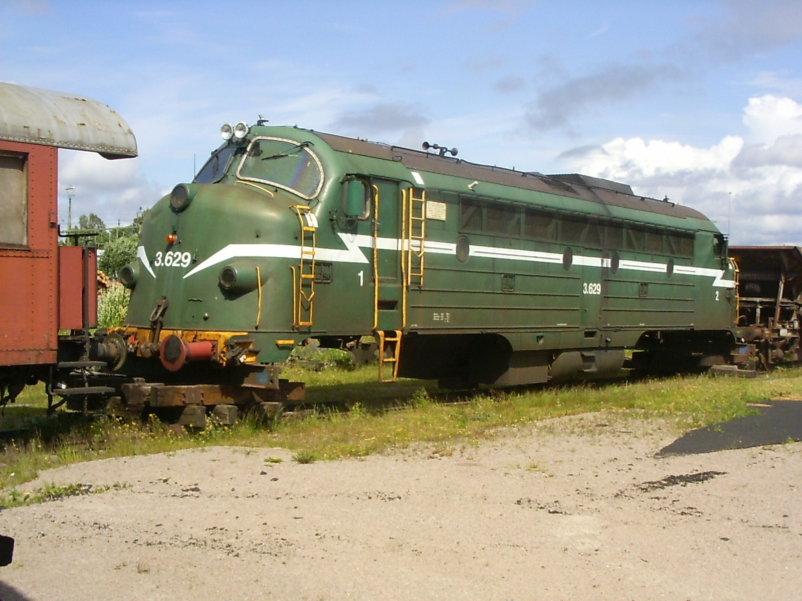 Järnvägsmuseum med Svanskogsbanan - JÅÅJ. Åmål, Åmål: NSB diesel locomotive